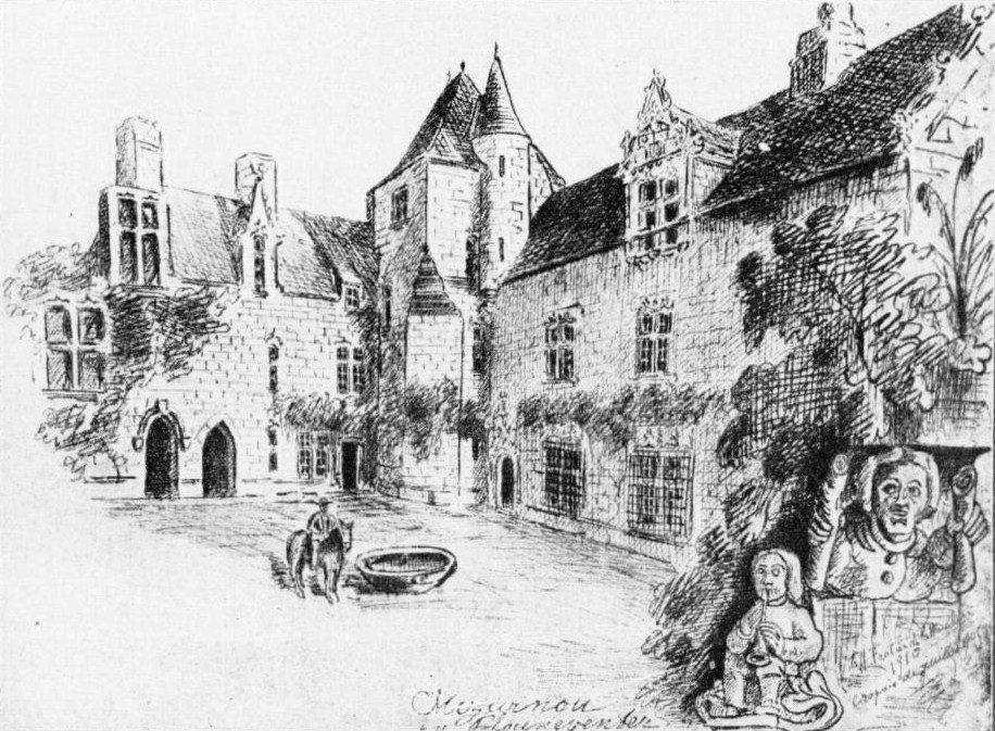 Le manoir de Mézarnou en Plounéventer (dessin vers 1910, J. Baudry, La Fontenelle le ligueur et le brigandage en Basse-Bretagne pendant la Ligue